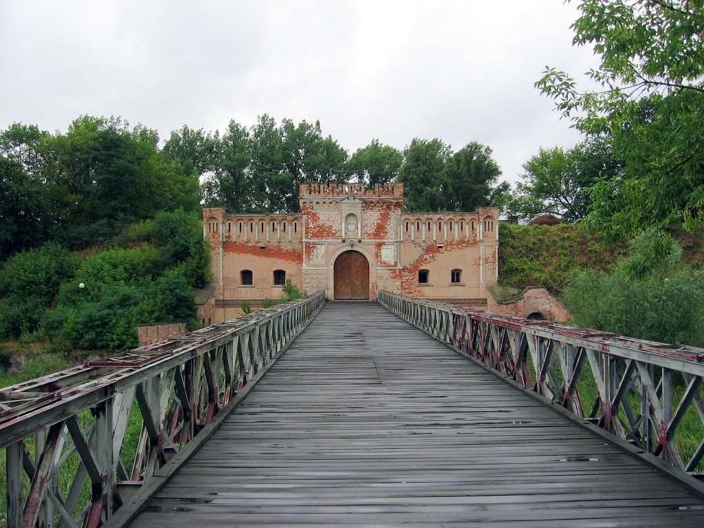 Cytadela w Dęblinie - Brama Lubelska (zabytek nr rejestr. 758)